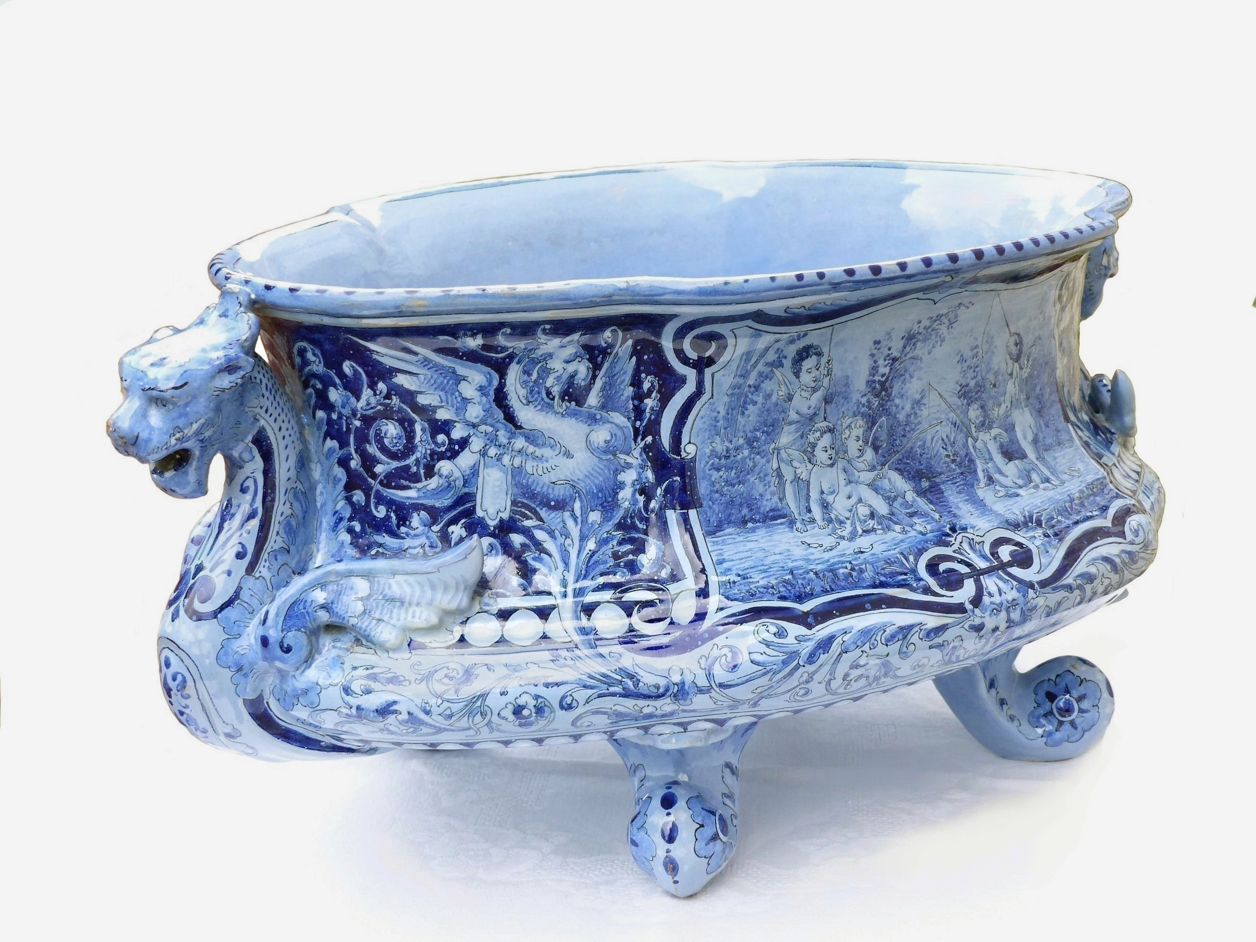 jardinière en camaïeu de bleus de Josaphat Tortat (1890)